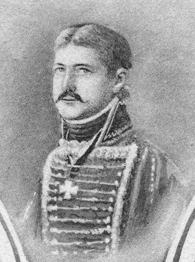 Kommandeur Ulanen-Regiment "Großherzog Friedrich von Baden" (Rheinisches) Nr. 7